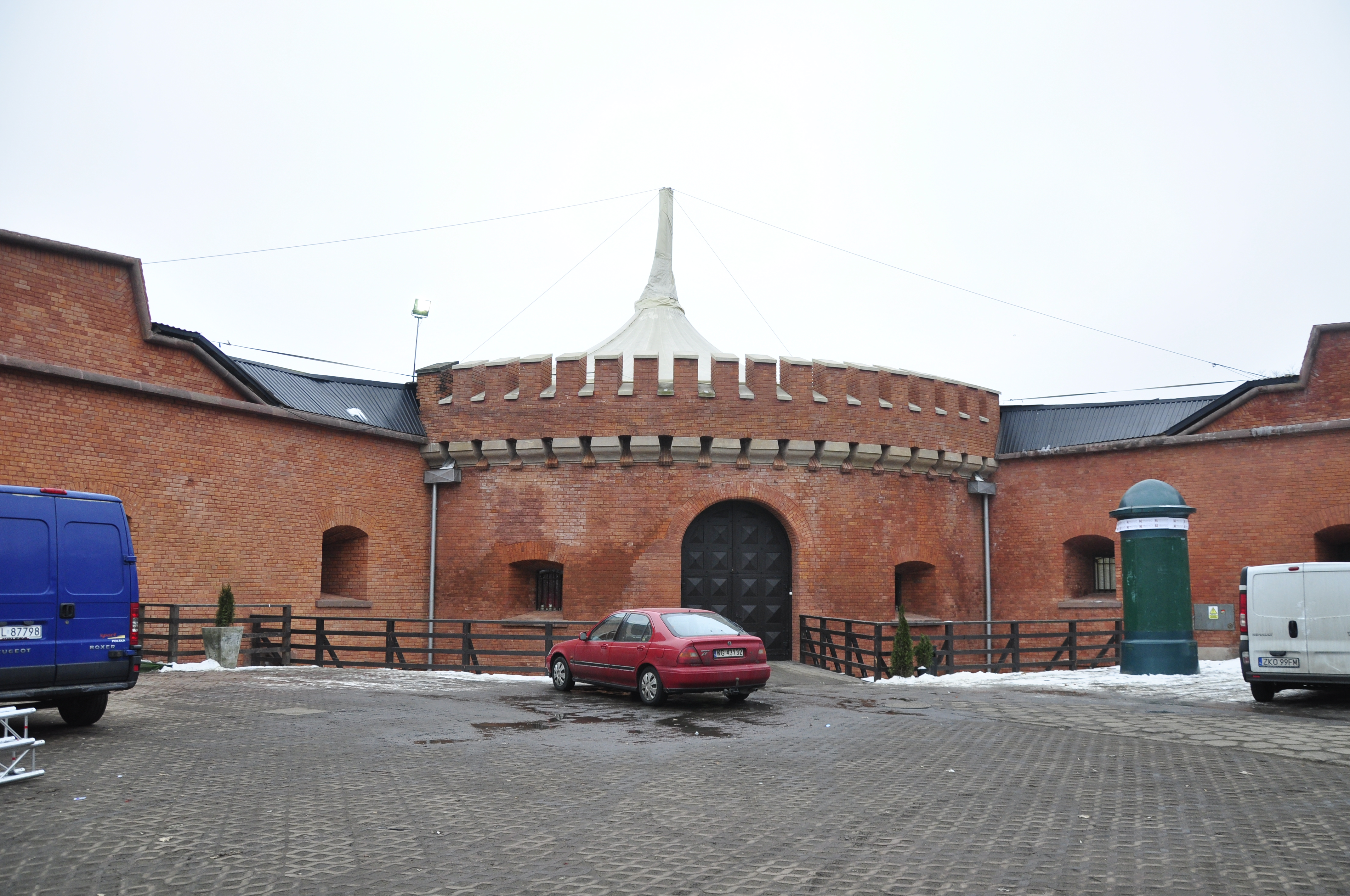 Fort Legionow, Warschau